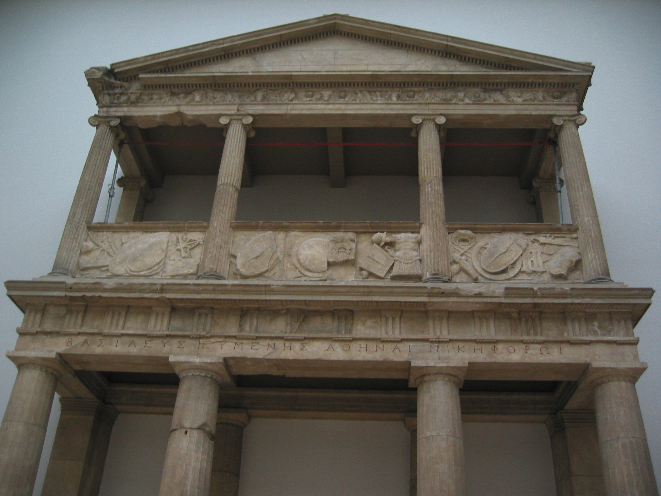 Propylon zum Athenaheiligtum von Pergamon, hellenistisch, um 180 v. Chr.